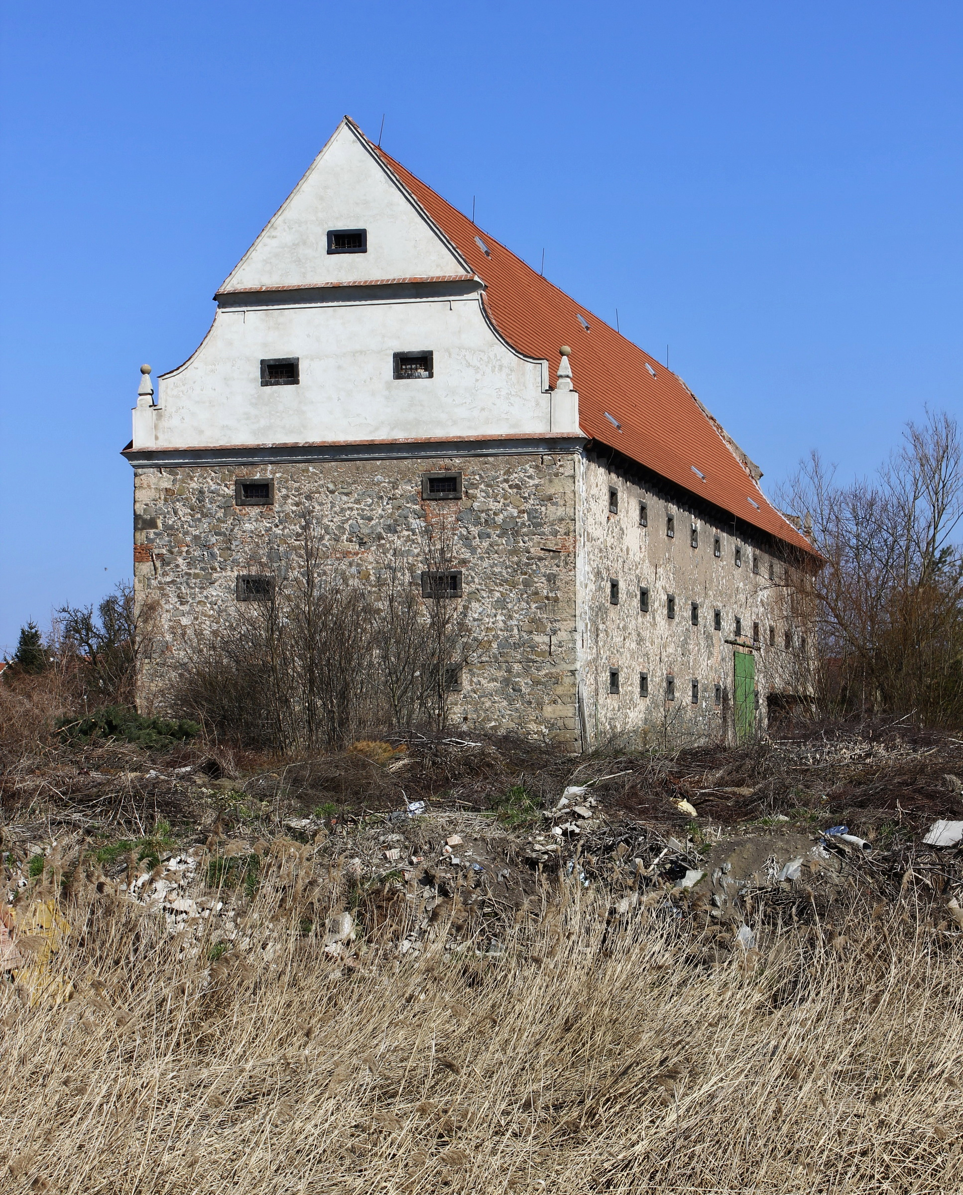 Staré Hradiště, špejchar.